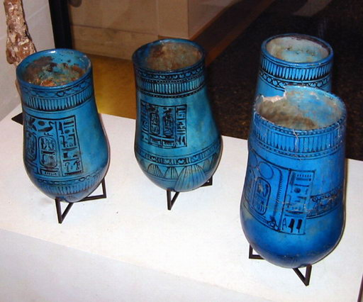 Vases au nom de Ramsès II - Antiquité égyptienne, Musée du Louvre, pavillon sully, 2002 Source : Greudin Vases aux noms de Ramsès ayant probablement servis lors de ses funérailles, Musée du Louvre.